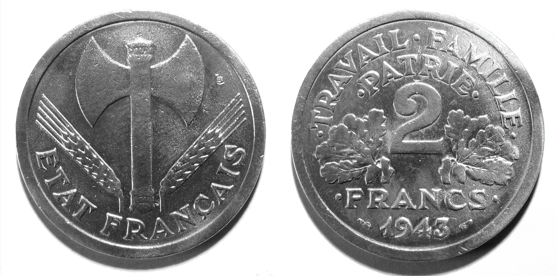 Piece de deux francs 1943, État Français, régime de Vichy